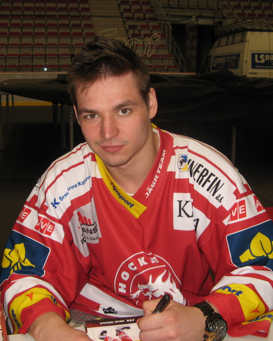 Po zakončení sezóny 2014/15 ve Werk Areně